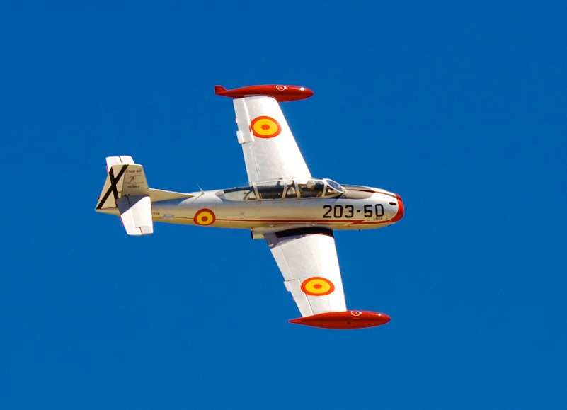 Hispano Aviación HA-200 Saeta.